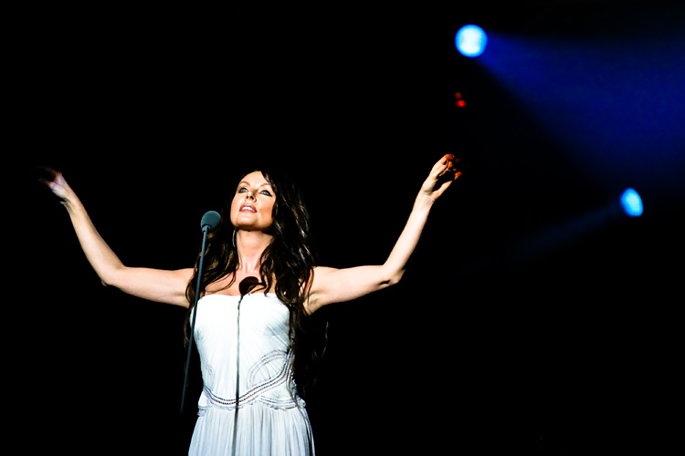 La soprano Sarah Brightman cantando en el Live Heart en la torre TV en China